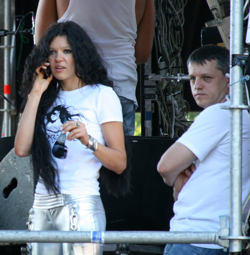 Певица Руслана и ее муж (менеждер, продюсер и соавтор) Александр Ксенофонтов